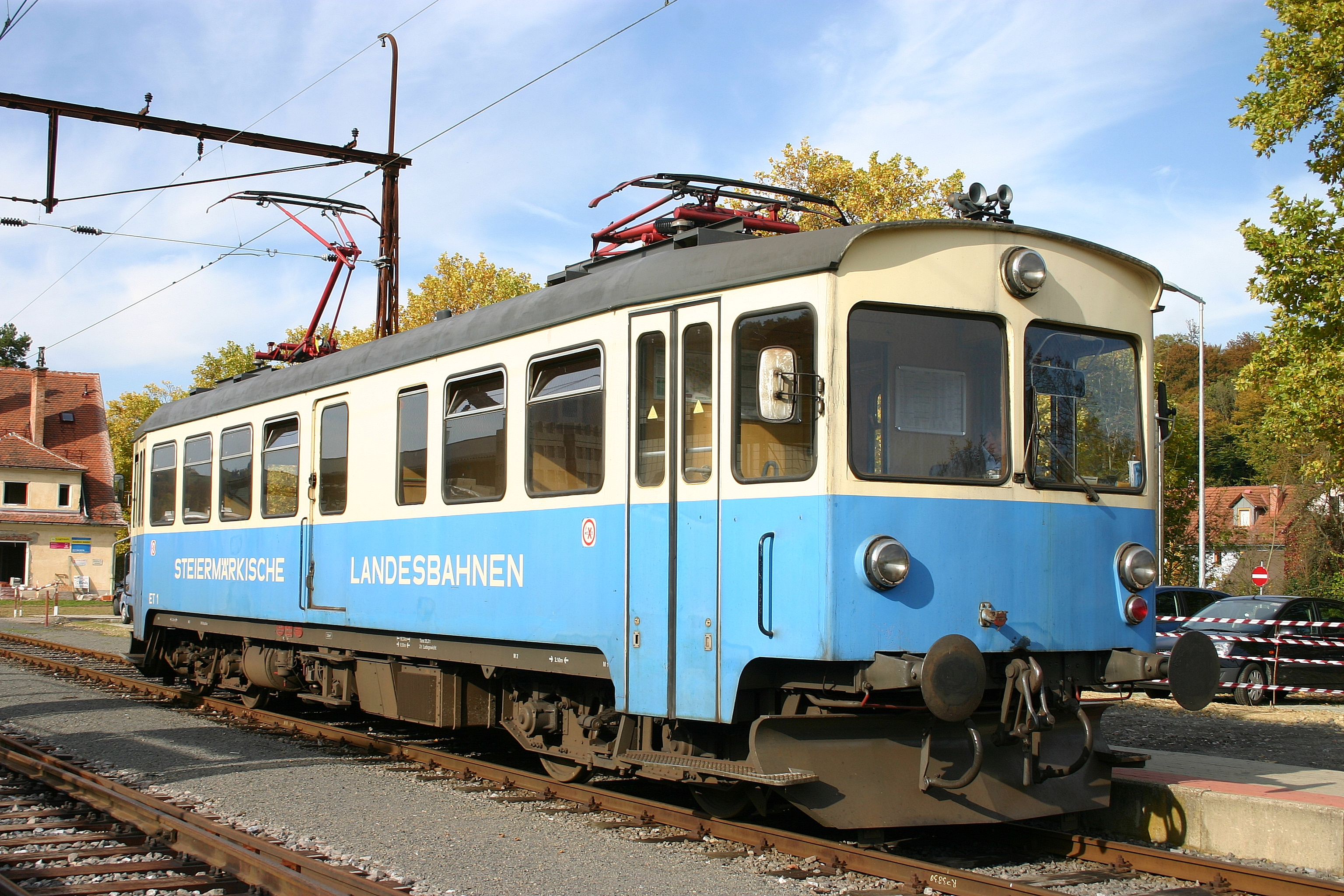 Steiermärkische Landesbahnen – Elektrotriebwagen „ET 1“ im Bahnhof Bad Gleichenberg